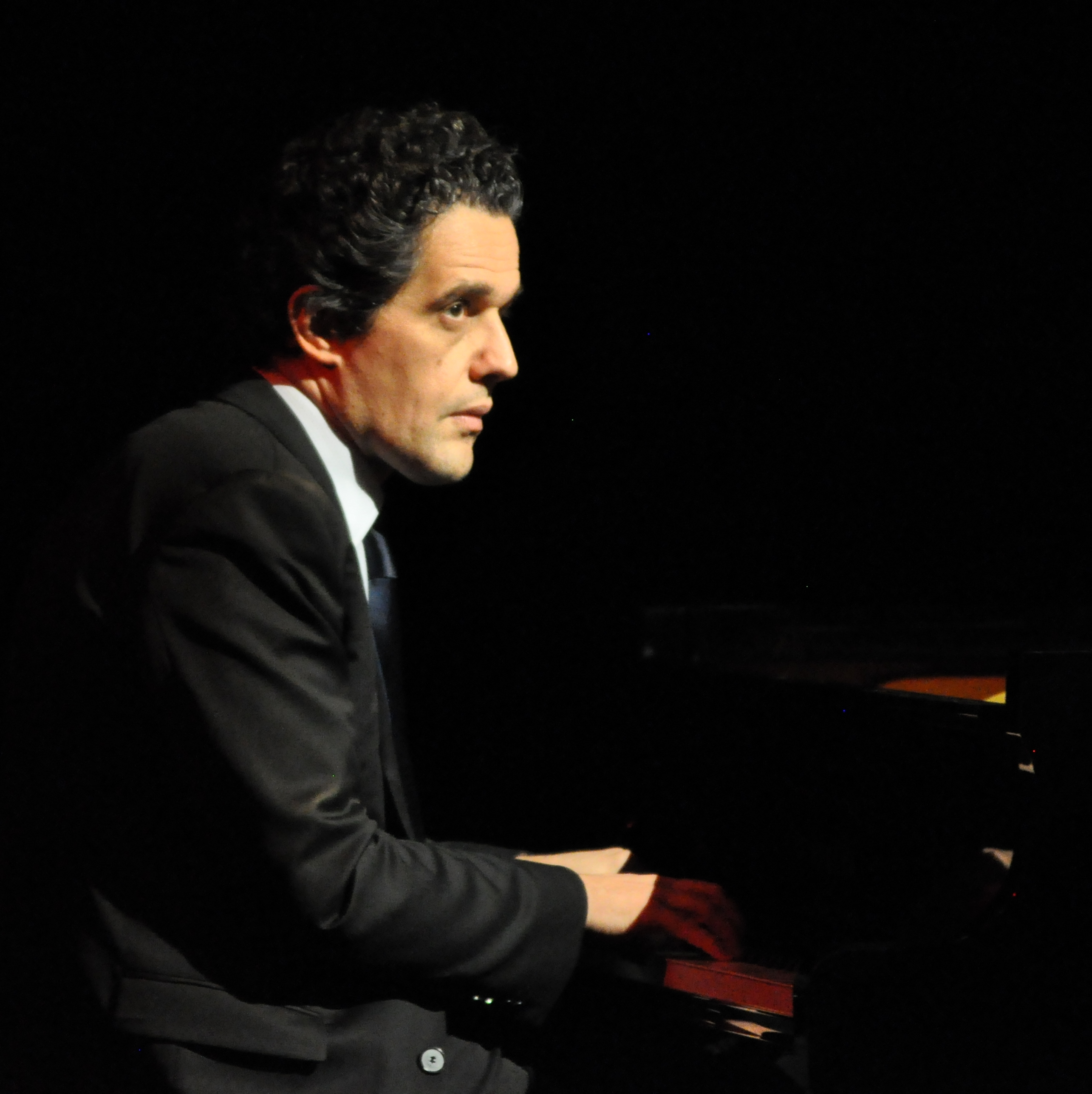 18 décembre 2016 à 45800 Saint Jean de Braye